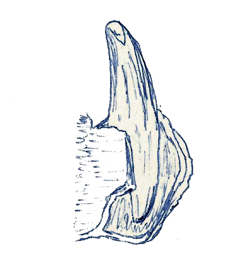 Illustration of a fossil of Lycorhinus